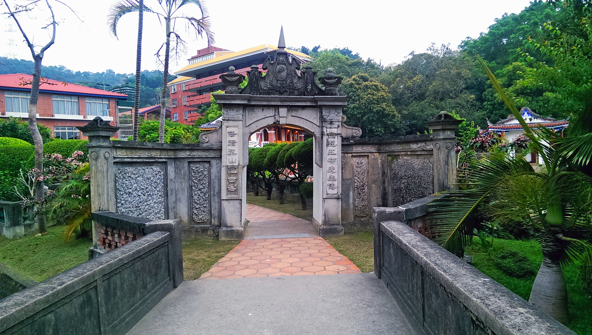 霧峰林家萊園入口